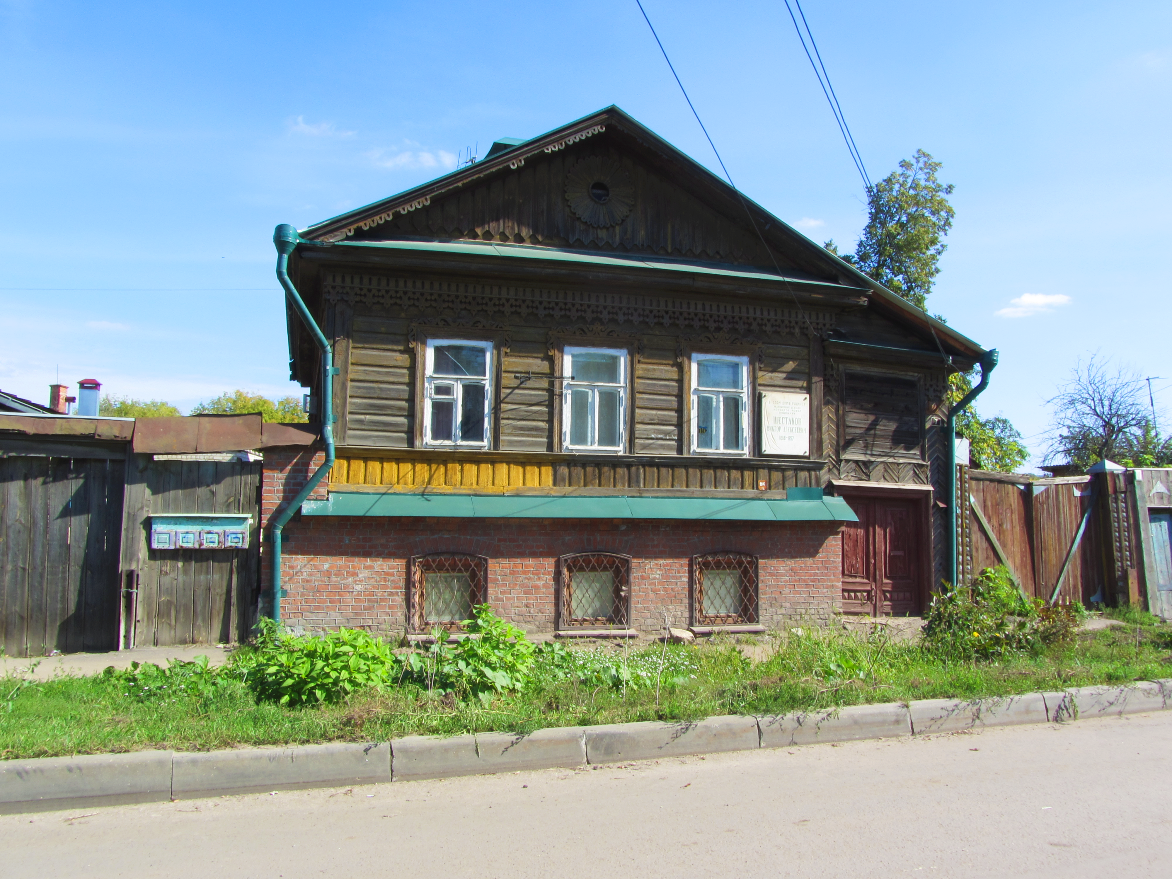 Дом, в котором родился художник В.А. Шестаков: улица 2-я Курская, 7, Орёл, Орловская область